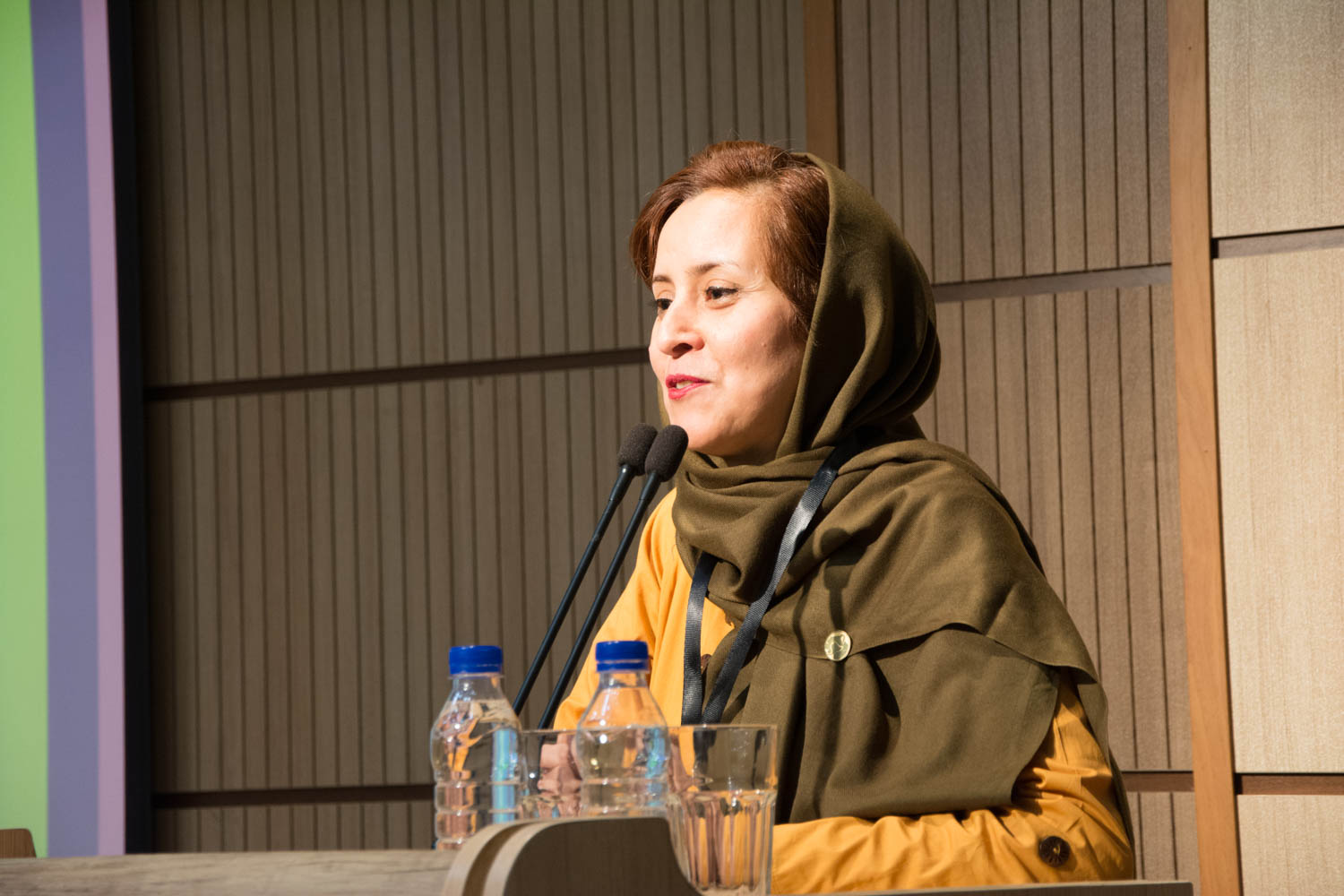 سخنرانی خانم لیلا قاسم زاده مدیرعامل انجمن یوزپلنگ ایرانی در سومین رویداد صبح خلاق تهران